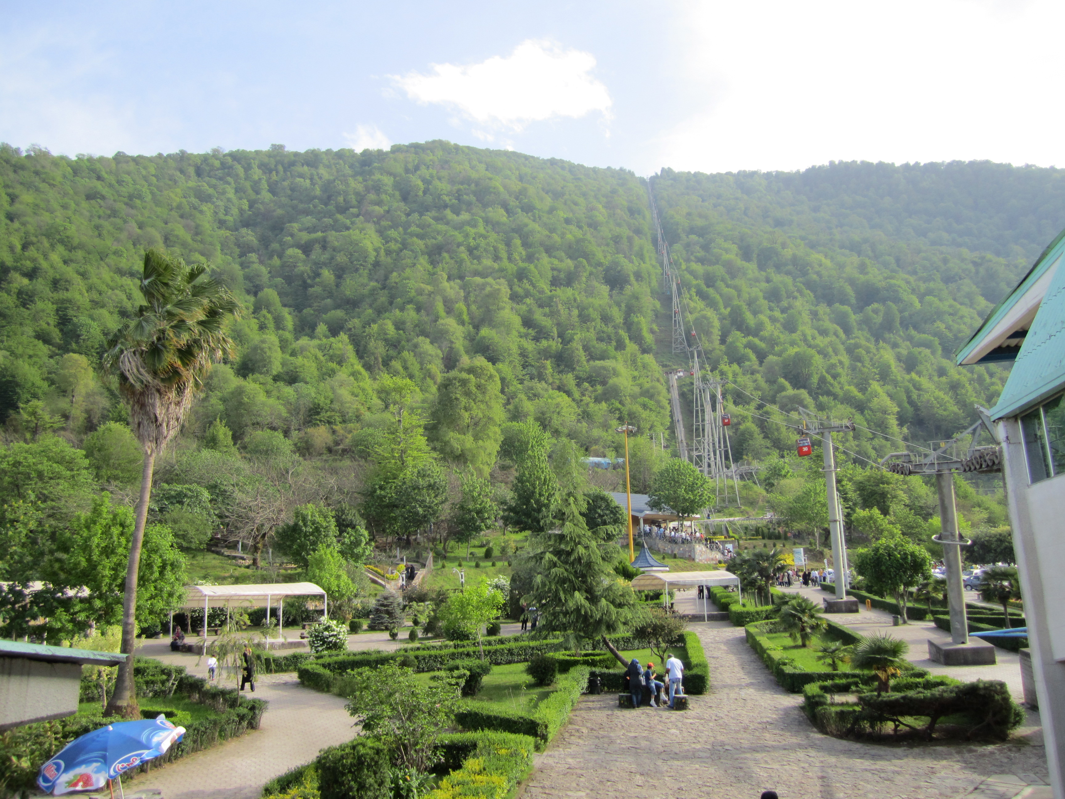 نمک آبرود